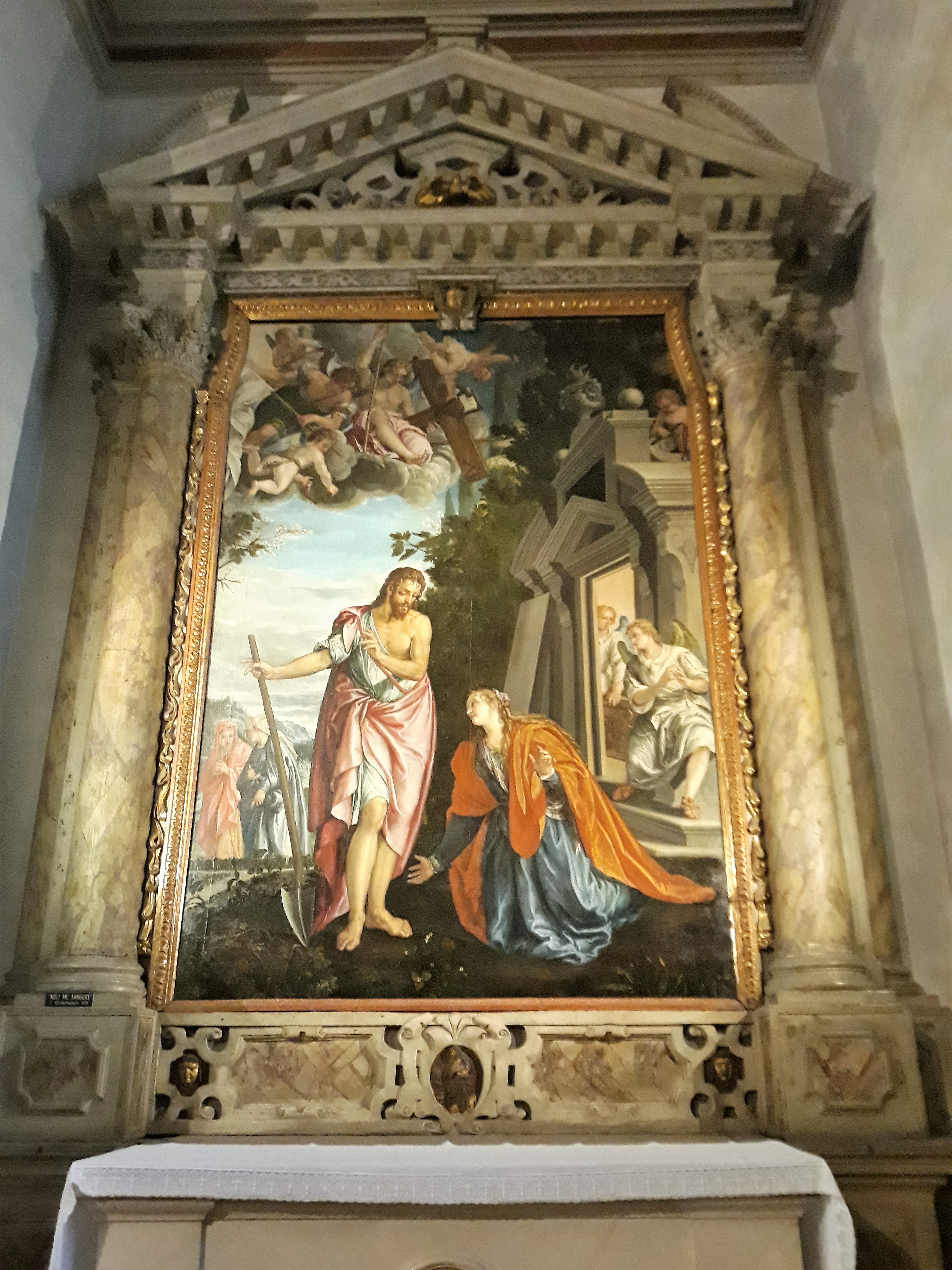 Altare laterale della chiesa di San Giorgio in Braida a Verona. La tela è del pittore veronese Francesco Montemazzano, allievo di Paolo Caliari (detto il Veronese), Titolo dell'opera: Noli Me Tangere.